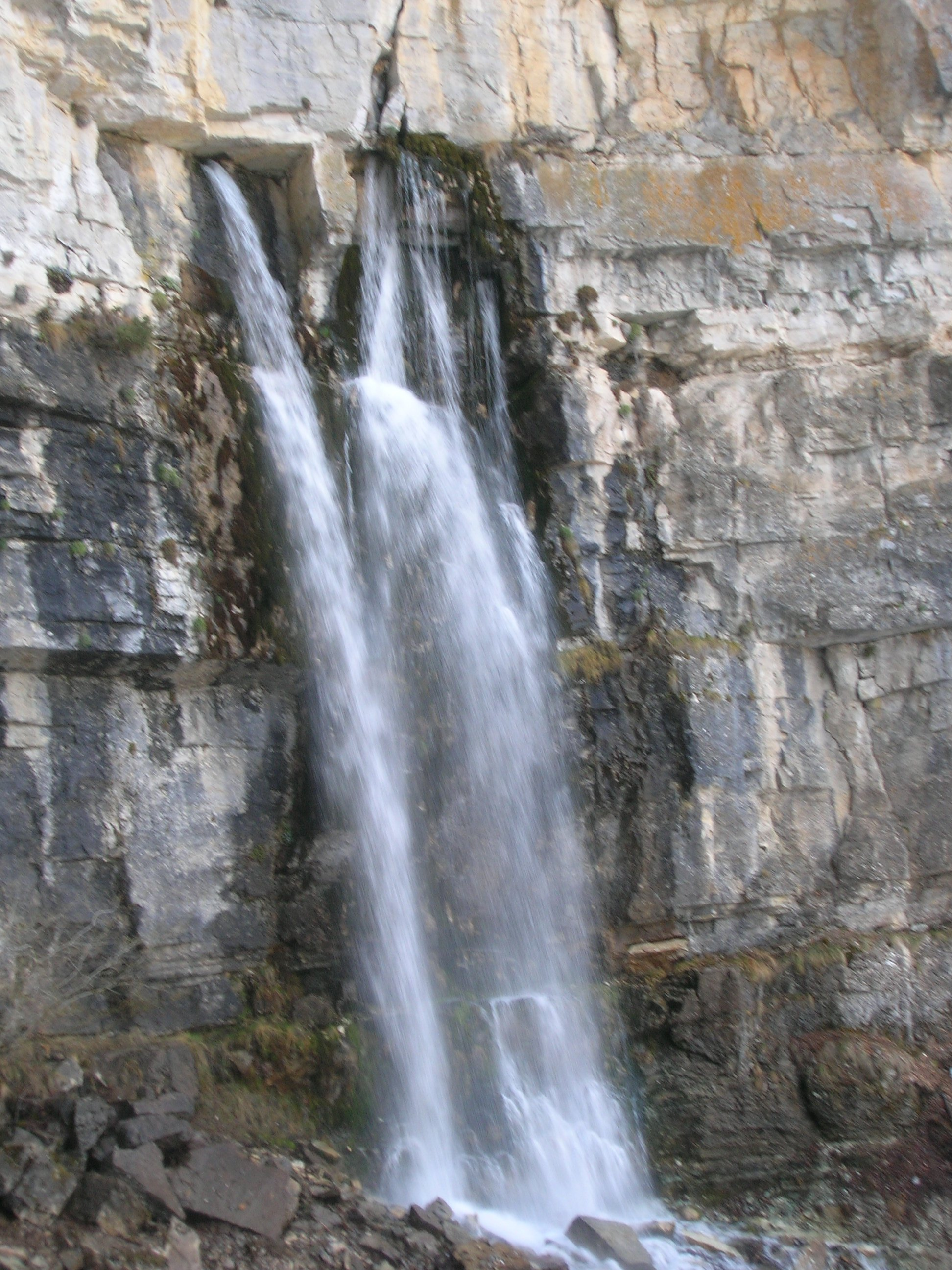 "Sorgenti del Pis" - Fiume Pesio (Cuneo, Piemonte, Italy)